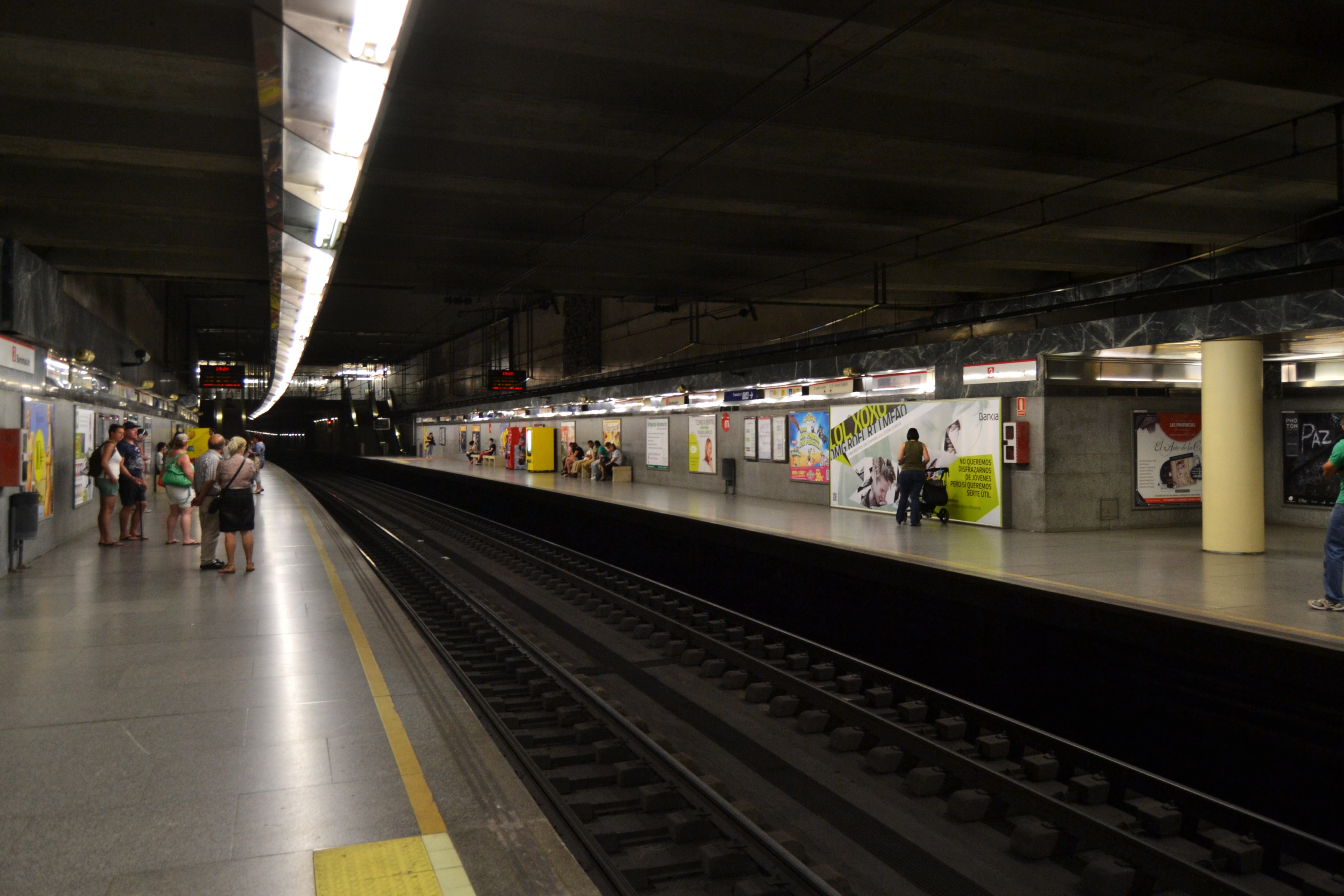 Estació de metro de Benimaclet, València.